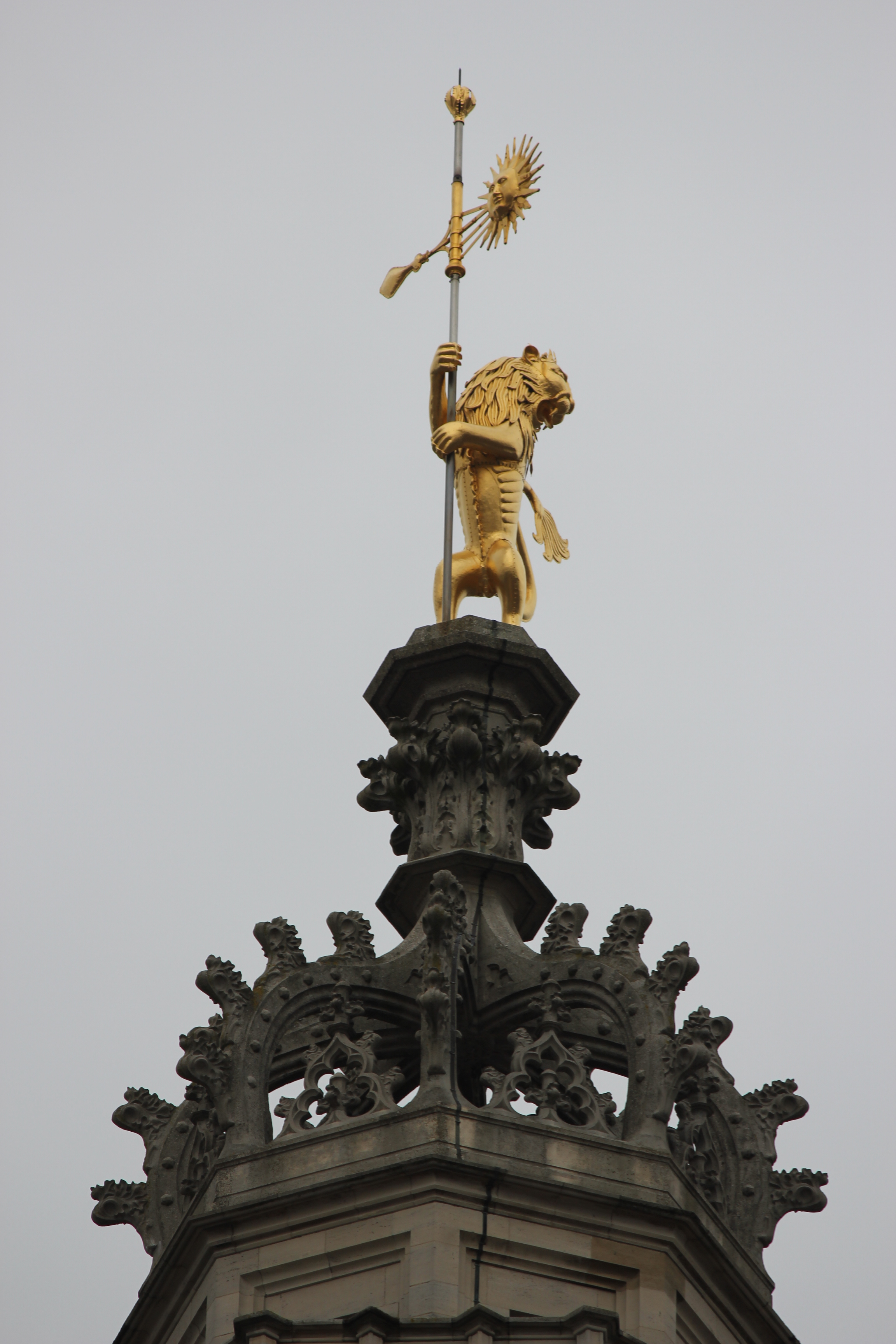 Arras Le beffroi- Le lion